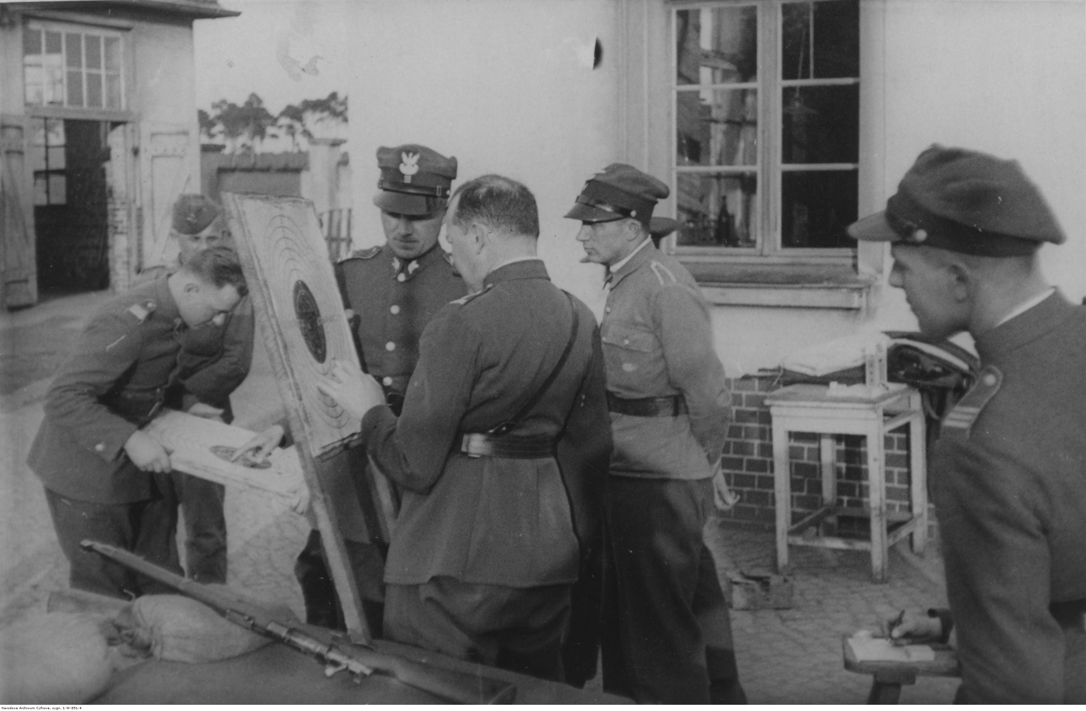 Zajęcia wychowania fizycznego w Szkole Podchorążych dla Podoficerów w Bydgoszczy. Komendant płk dypl. Stefan Kossecki oblicza ilość trafień na tarczy podczas ćwiczenia sekcji strzeleckiej. Koncern Ilustrowany Kurier Codzienny - Archiwum Ilustracji. Sygnatura: 1-W-851-4